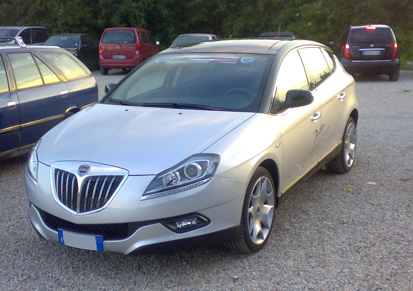 lancia delta fotografata a cavarzere